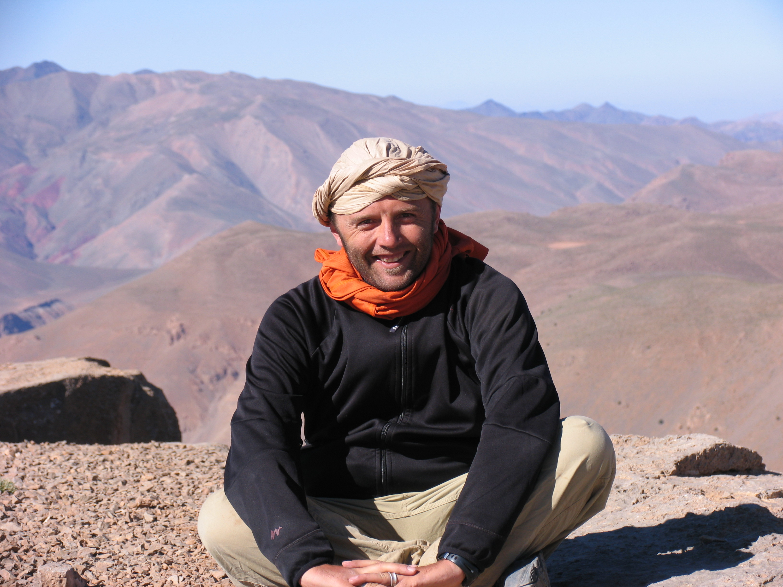 Stéphane Dugast dans un désert